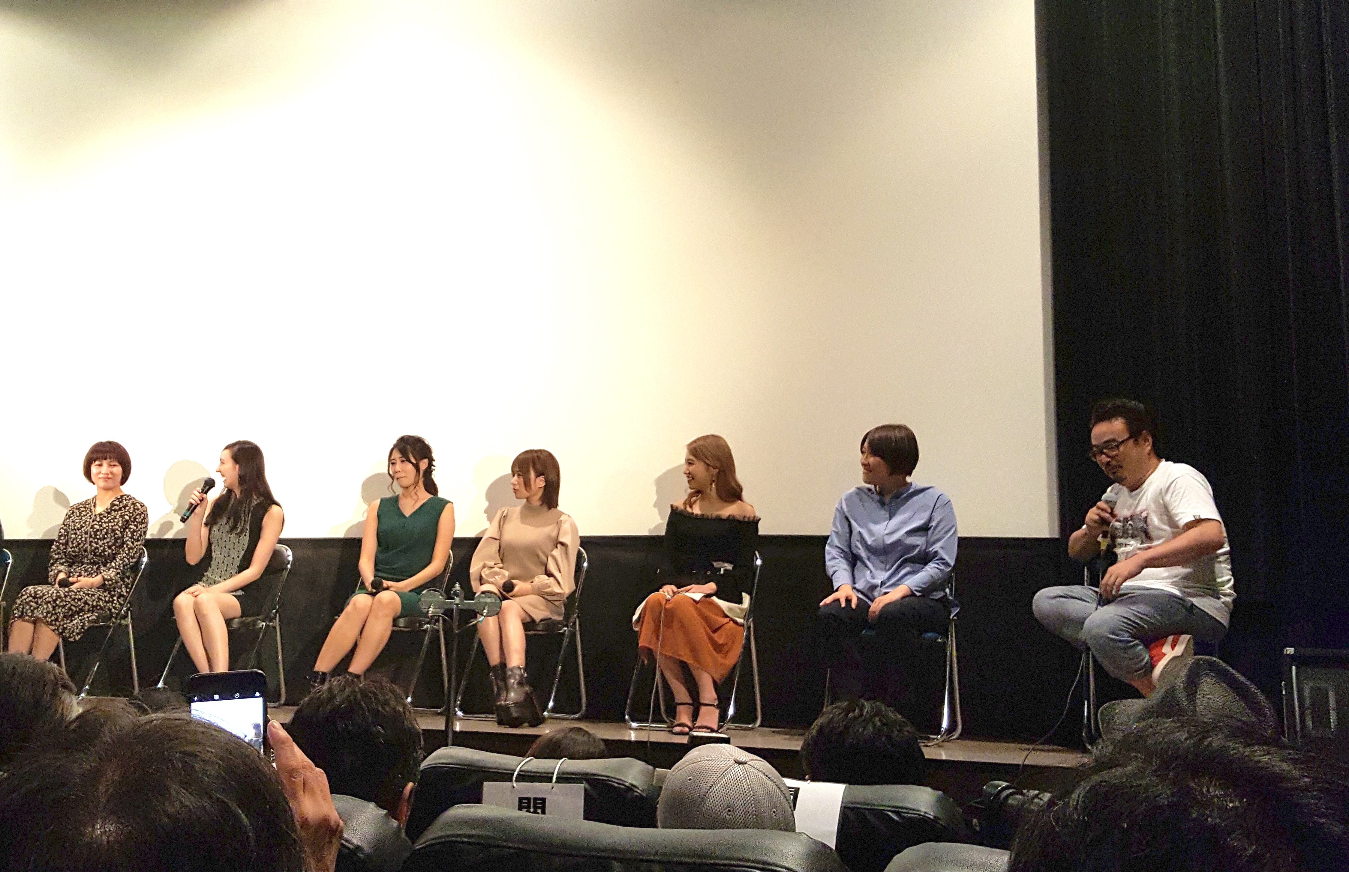 映画「バージン協奏曲 それゆけ純白パンツ!」公開舞台挨拶（2019年）